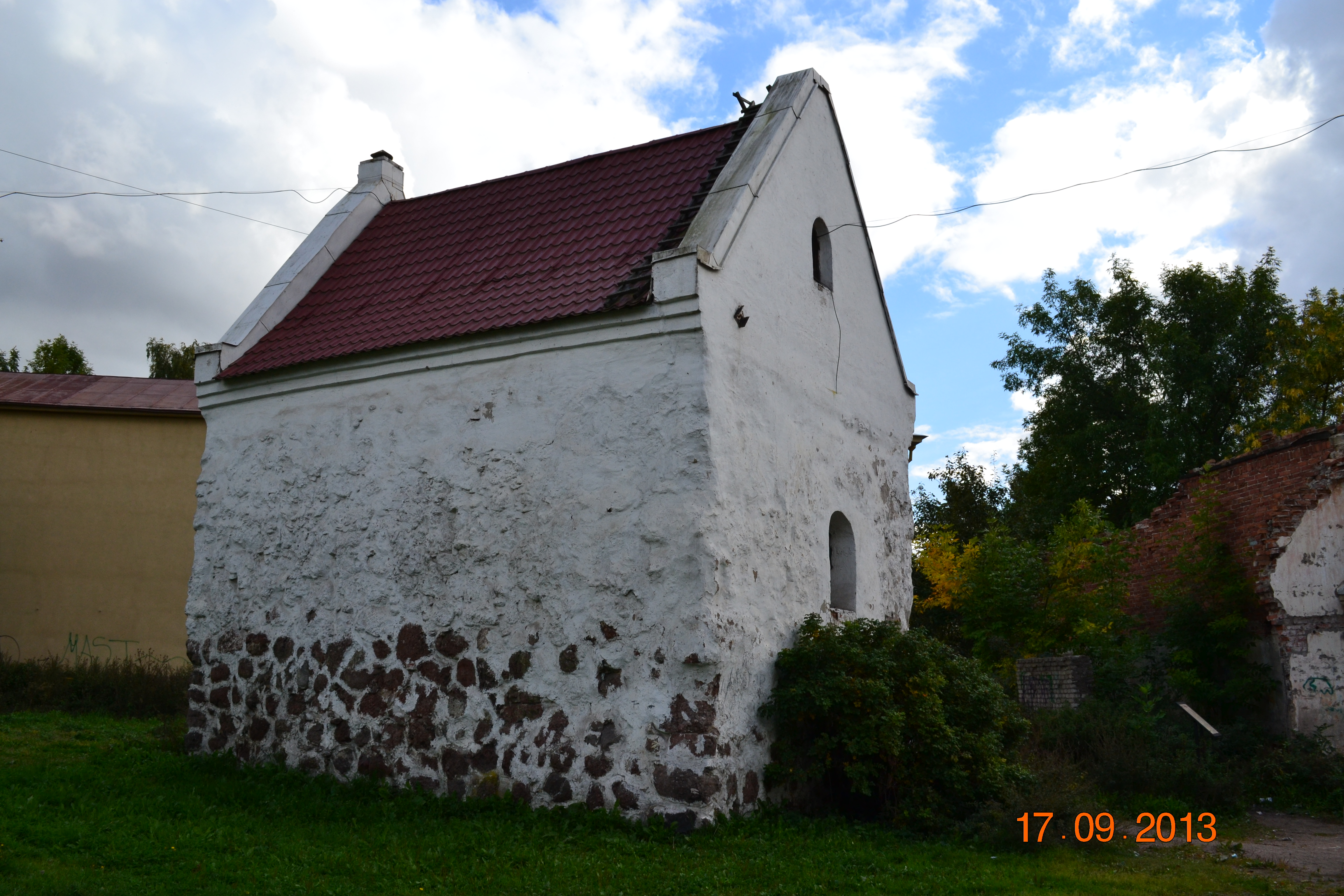 Дом купеческой гильдии Святого Духа (Санкт-Петербург и Лен.область, Выборг, Выборгская улица, 8)